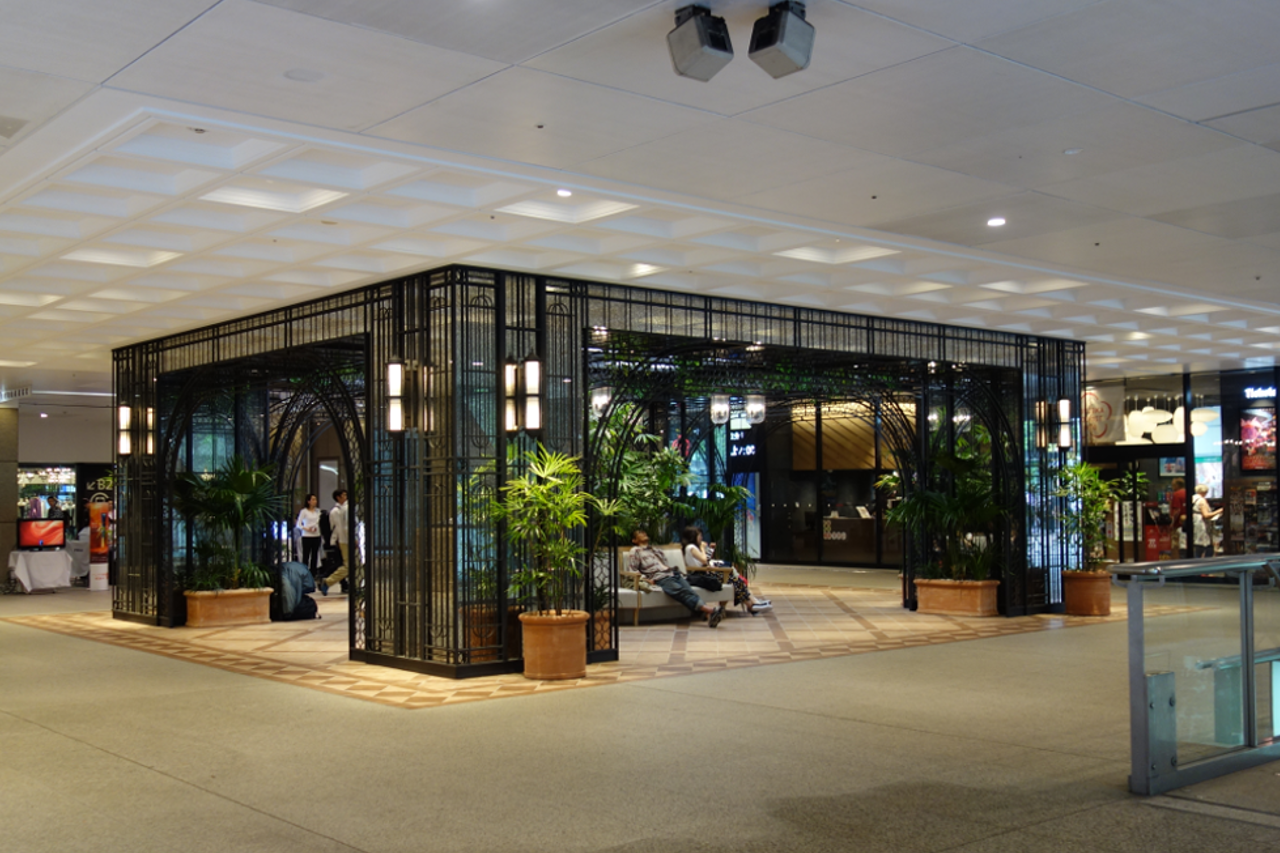 ライオン広場(リニューアル後)